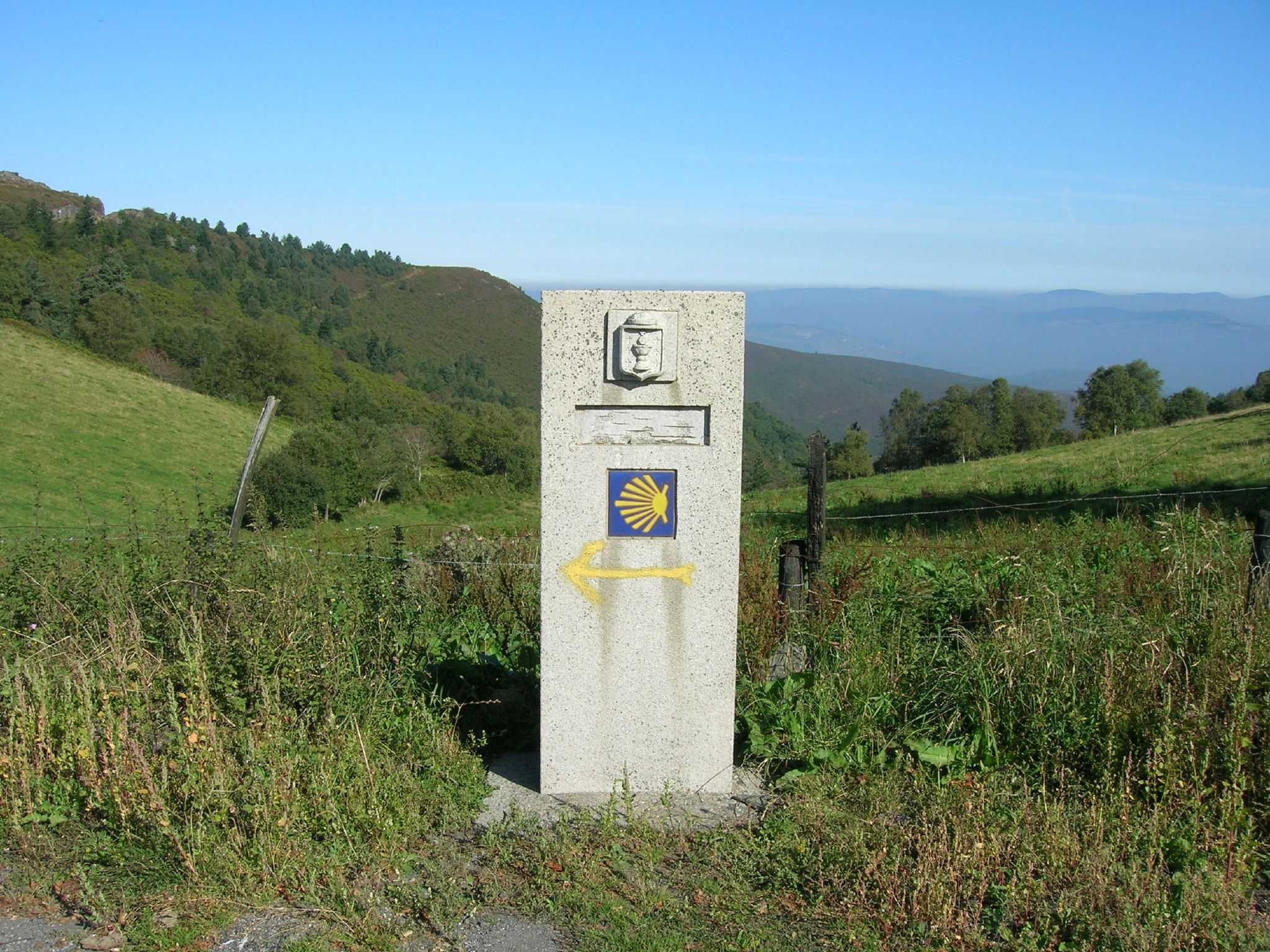 El primer mojón en tierras de Galicia.